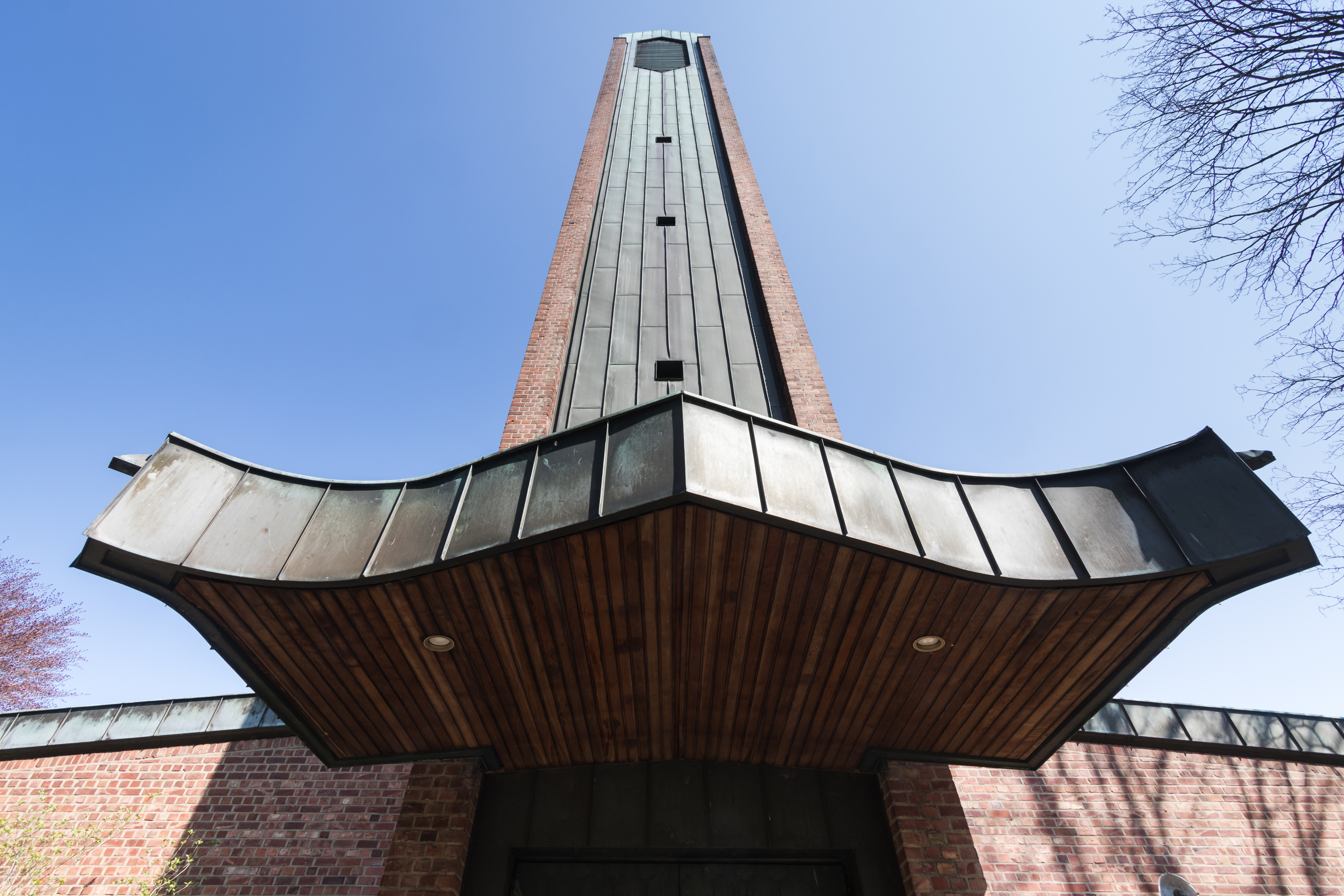 Kirche St. Bruder Klaus, Köln-Mülheim. Architekt: Fritz Schaller